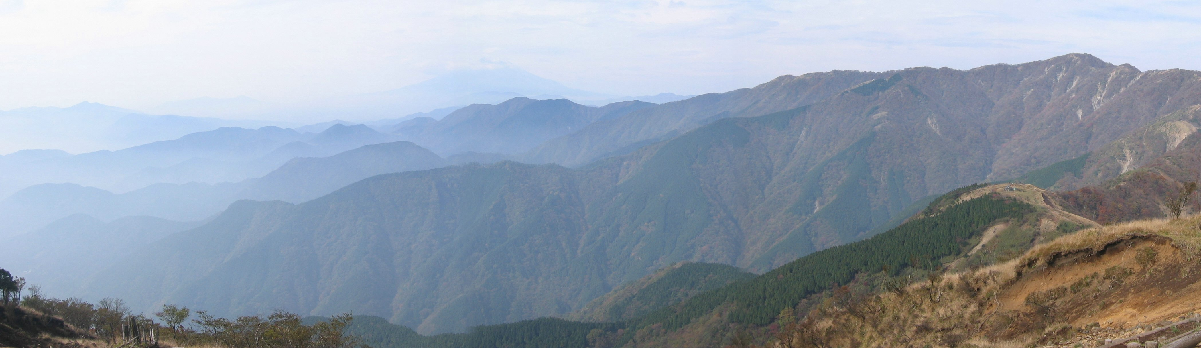 三ノ塔から見た大倉尾根